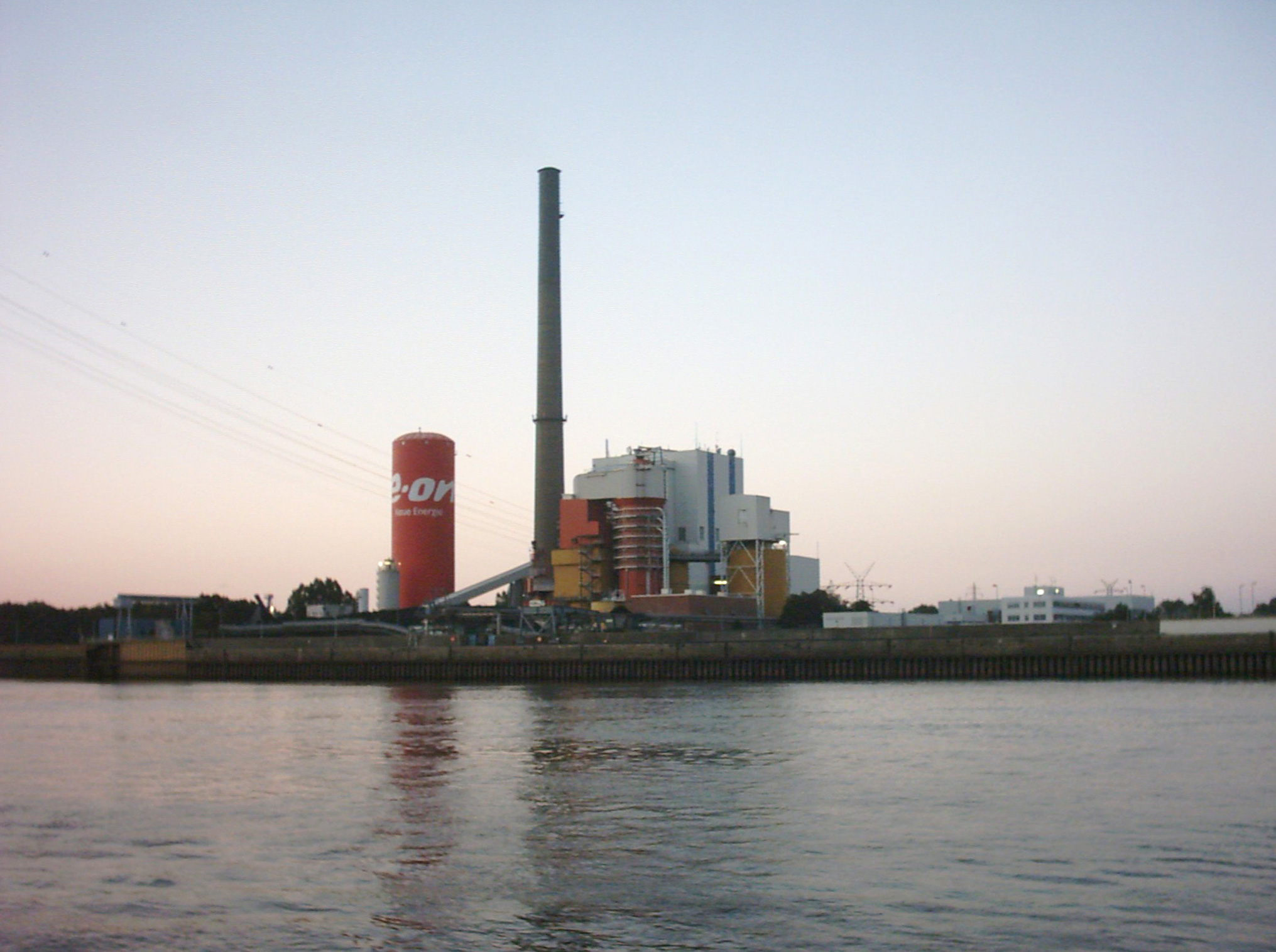 Steinkohlekraftwerk der E.ON in Farge, Unterweser - selbst fotografiert 8/2005 - GNU-FDL